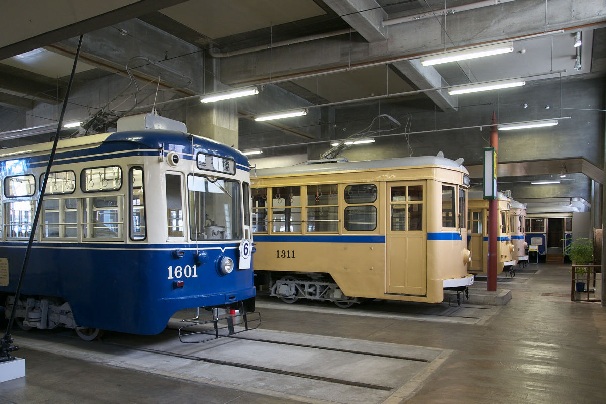 横浜市電保存館（Yokohama Tramport）の保存車両。